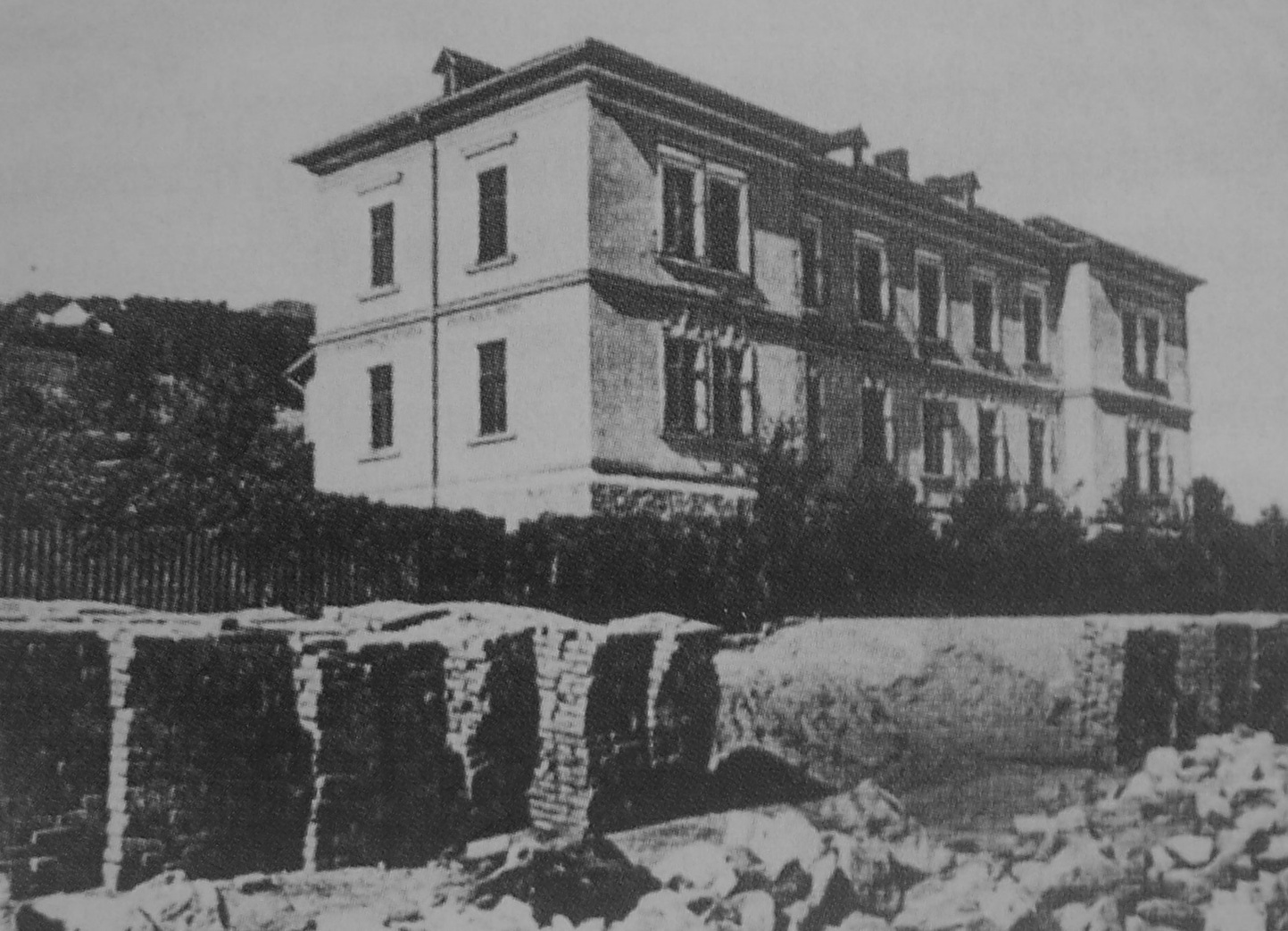 Budynek bursy przy ulicy F. Szopena 5 w Sanoku